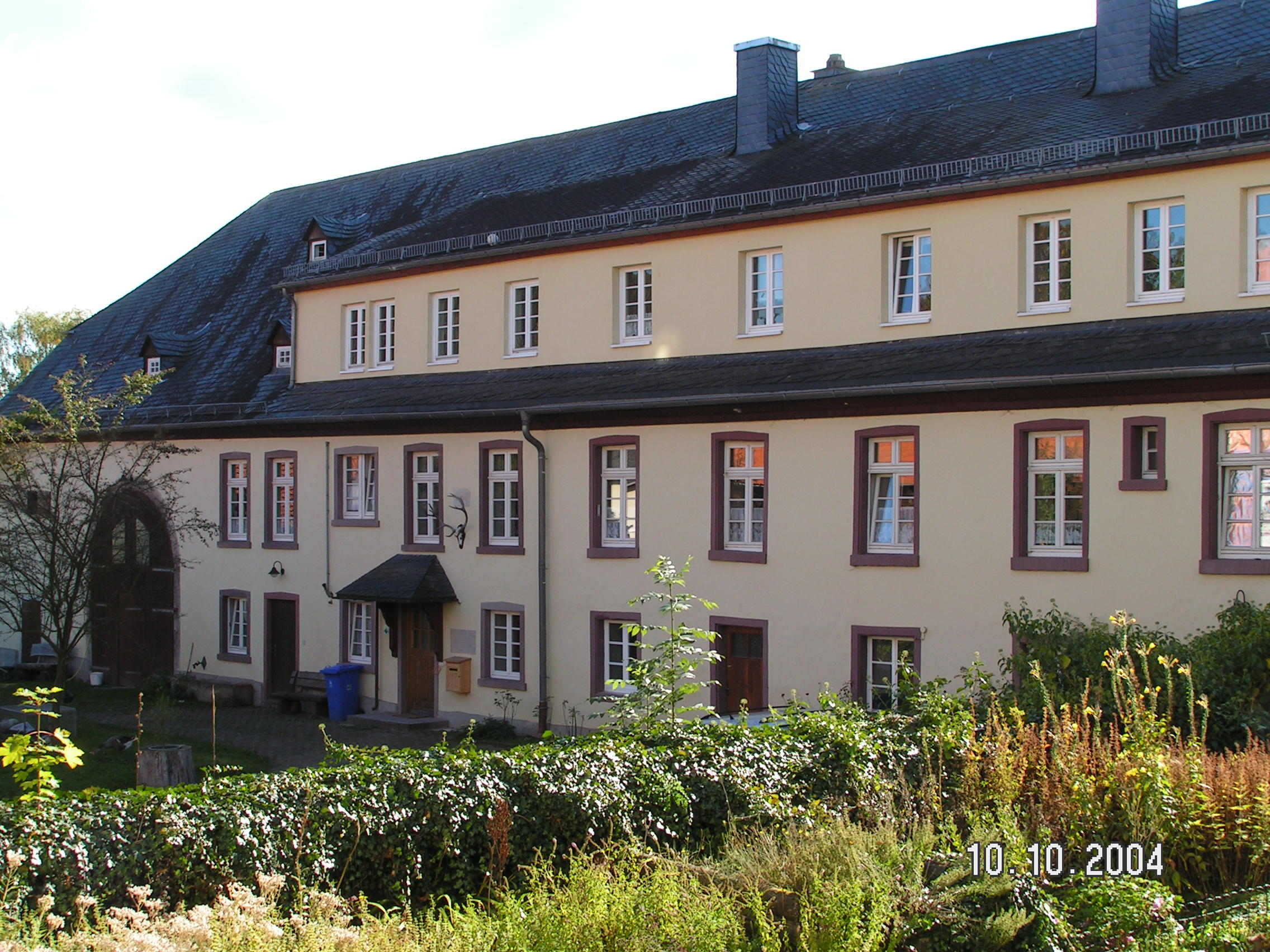 Hessisches Forstamt Vöhl Kgl. Preußische Oberförsterei seit 1866